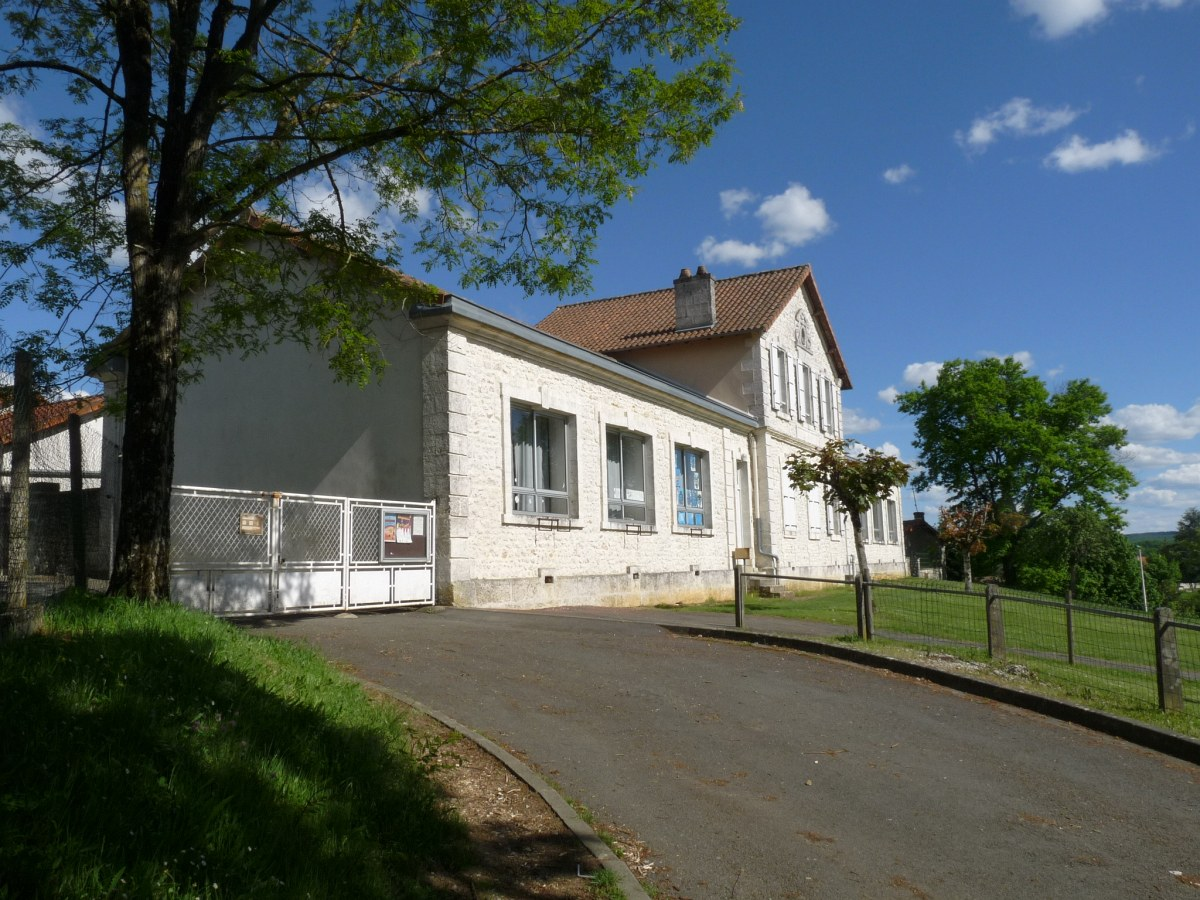 Ecole de Chazelles, Charente, France